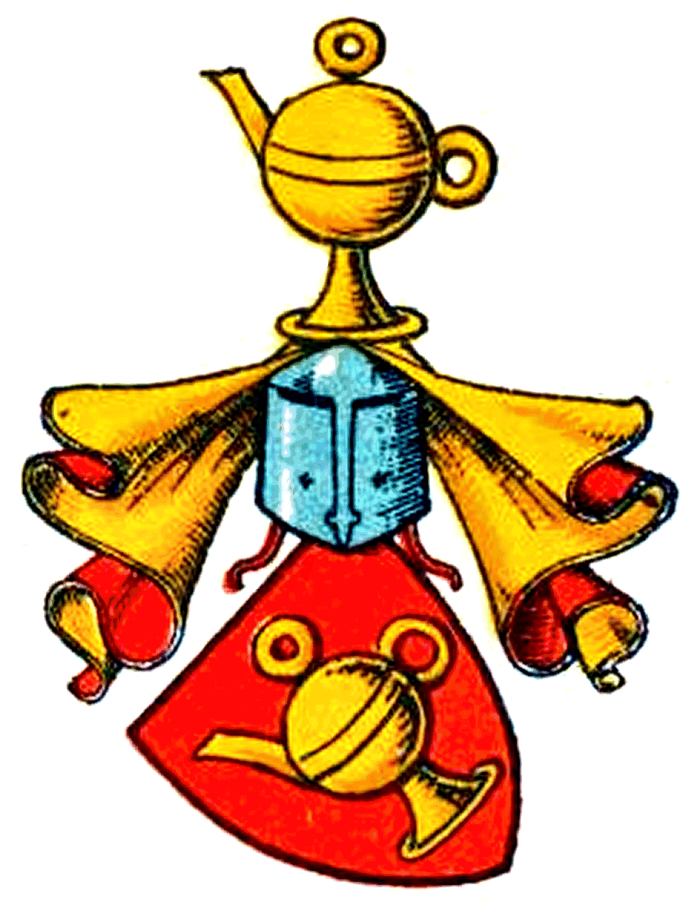 Wappen derSchilling von Canstatt